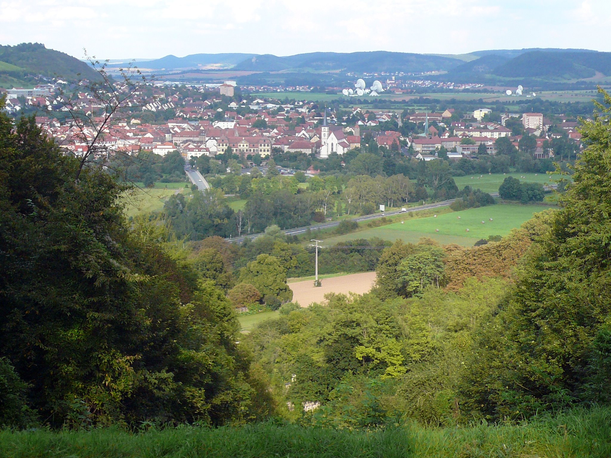 Kapellenkreuzweg Kloster Altstadt, Blickachse von der Station 12